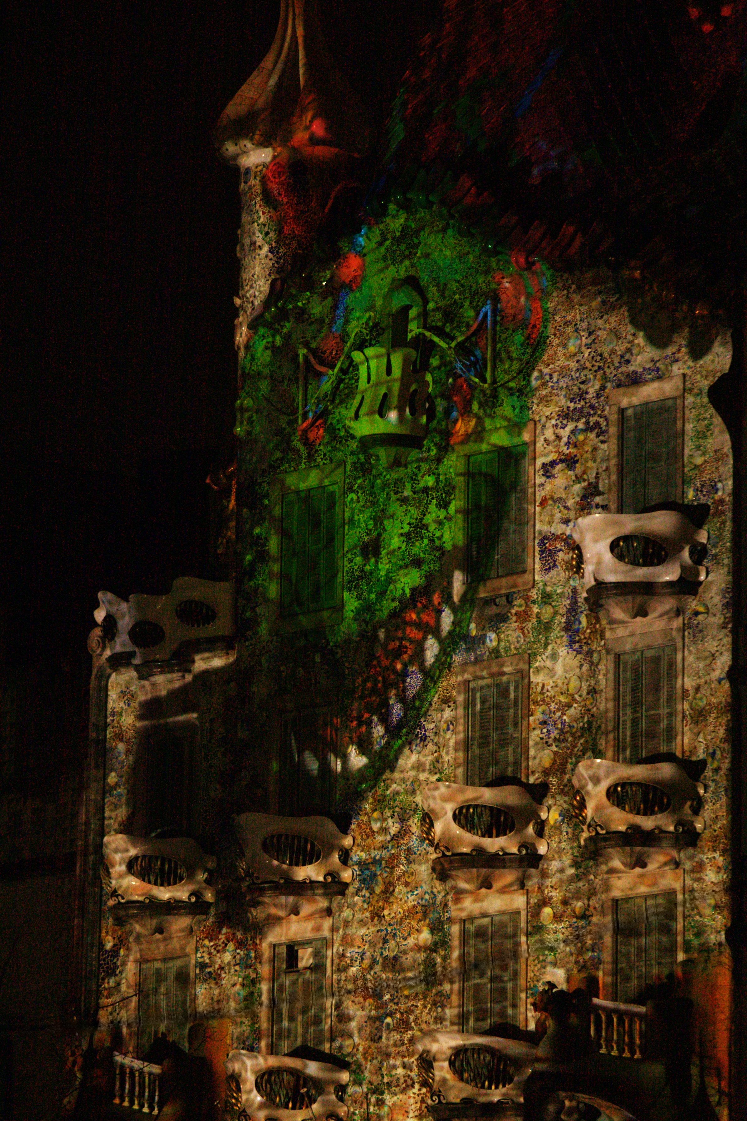 Drac de la casa Batlló. Projecció en vídeo mapping en commemoració dels 10 anys de l'obertura al públic de la casa Batlló.